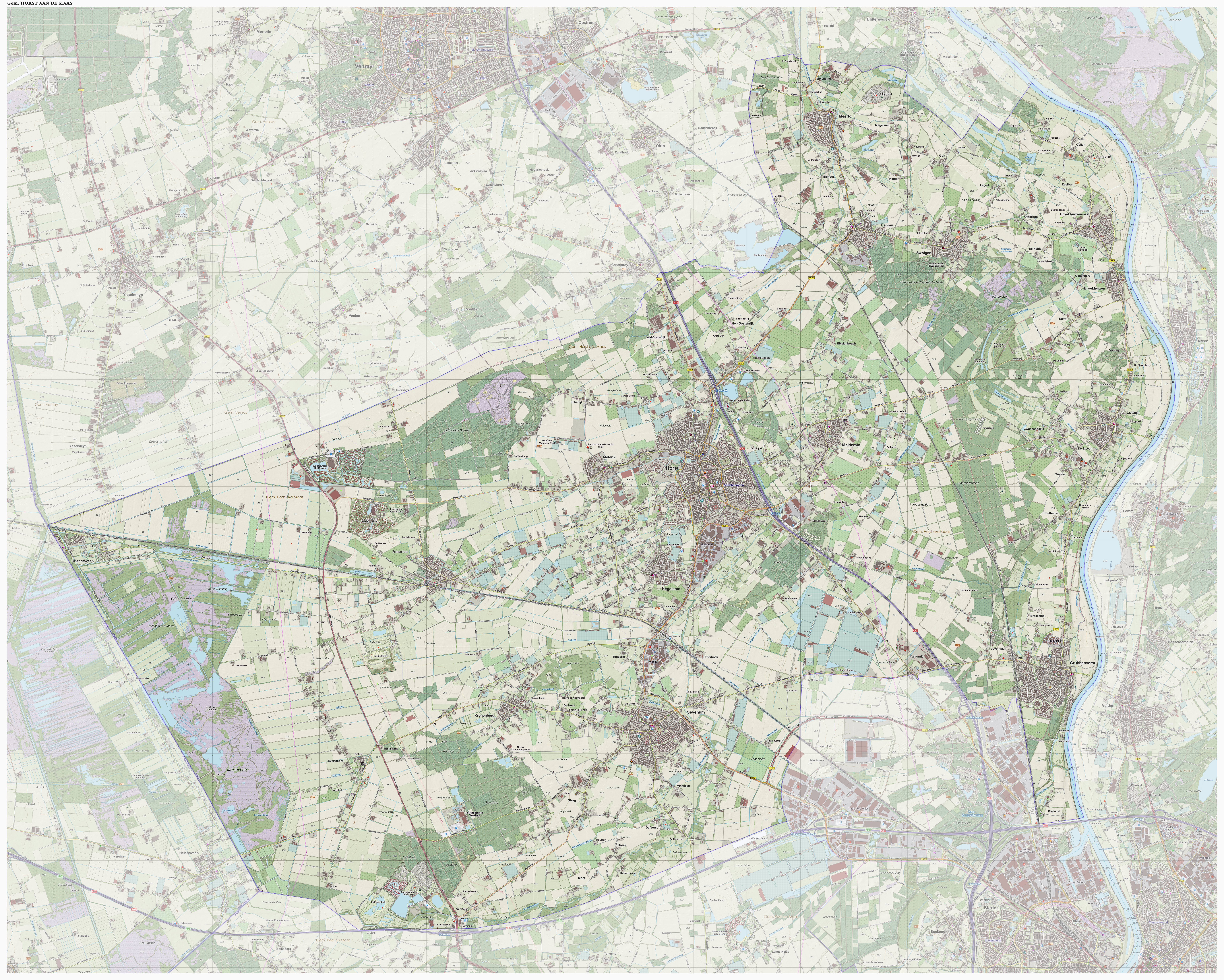 Topografische gemeentekaart. Resolutie: 300 pixels/km. Kaartbeeld samengesteld uit de open geodata van de Top10NL en Top25namen (Kadaster), Creative Commons-BY licentie. Gebouwvlakken uit open geodata BAG extract. Wegen uit de OpenStreetMap, OpenStreetMap community. Reliëfschaduw uit de Actuele Hoogtekaart AHN2. Samenstelling en kleurenschema: Jan-Willem van Aalst, met QGIS. Zie ook de Legenda.